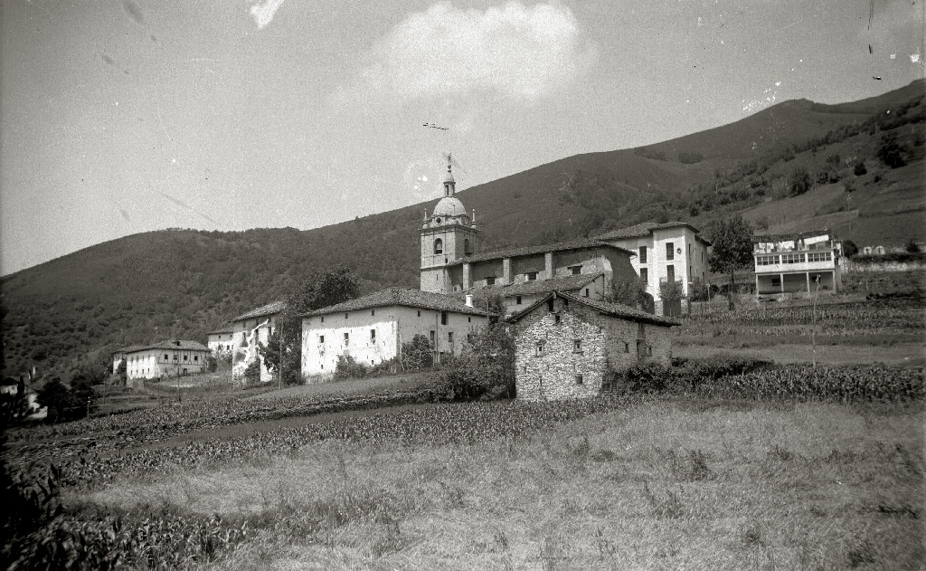 Título original: Vista de la localidad de Elduaien (1/1) Localización: Elduayen (Guipúzcoa)